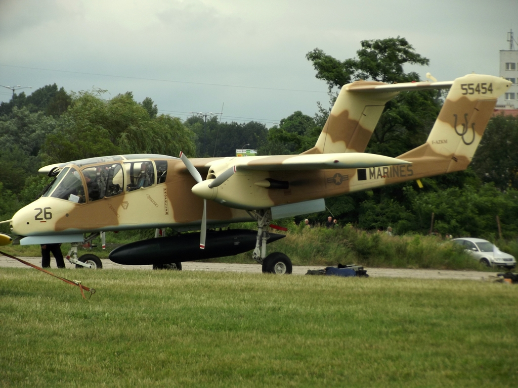 Zdjęcie zrobione podczas IX Małopolskiego Pikniku Lotniczego w Krakowie.